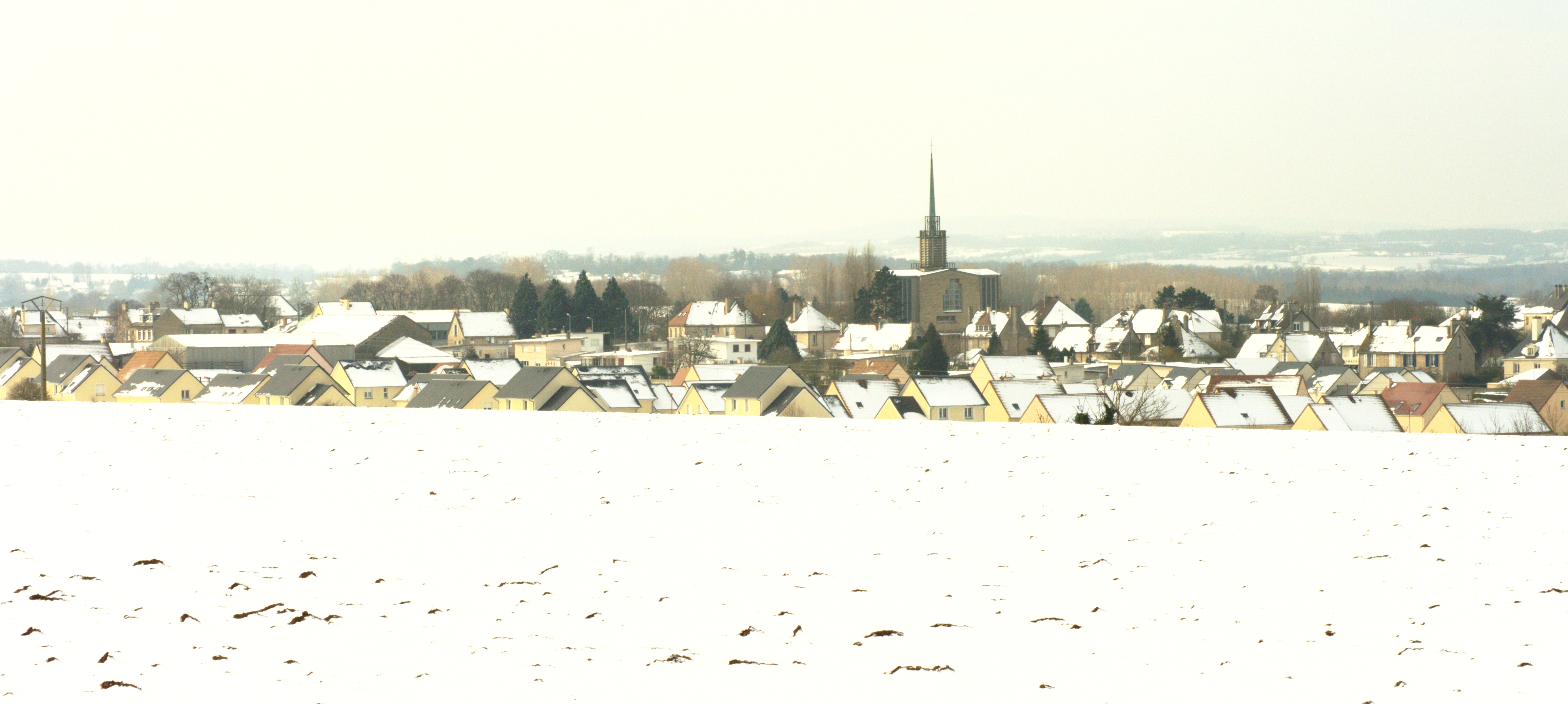 Le village de May-sur-Orne sous la naige